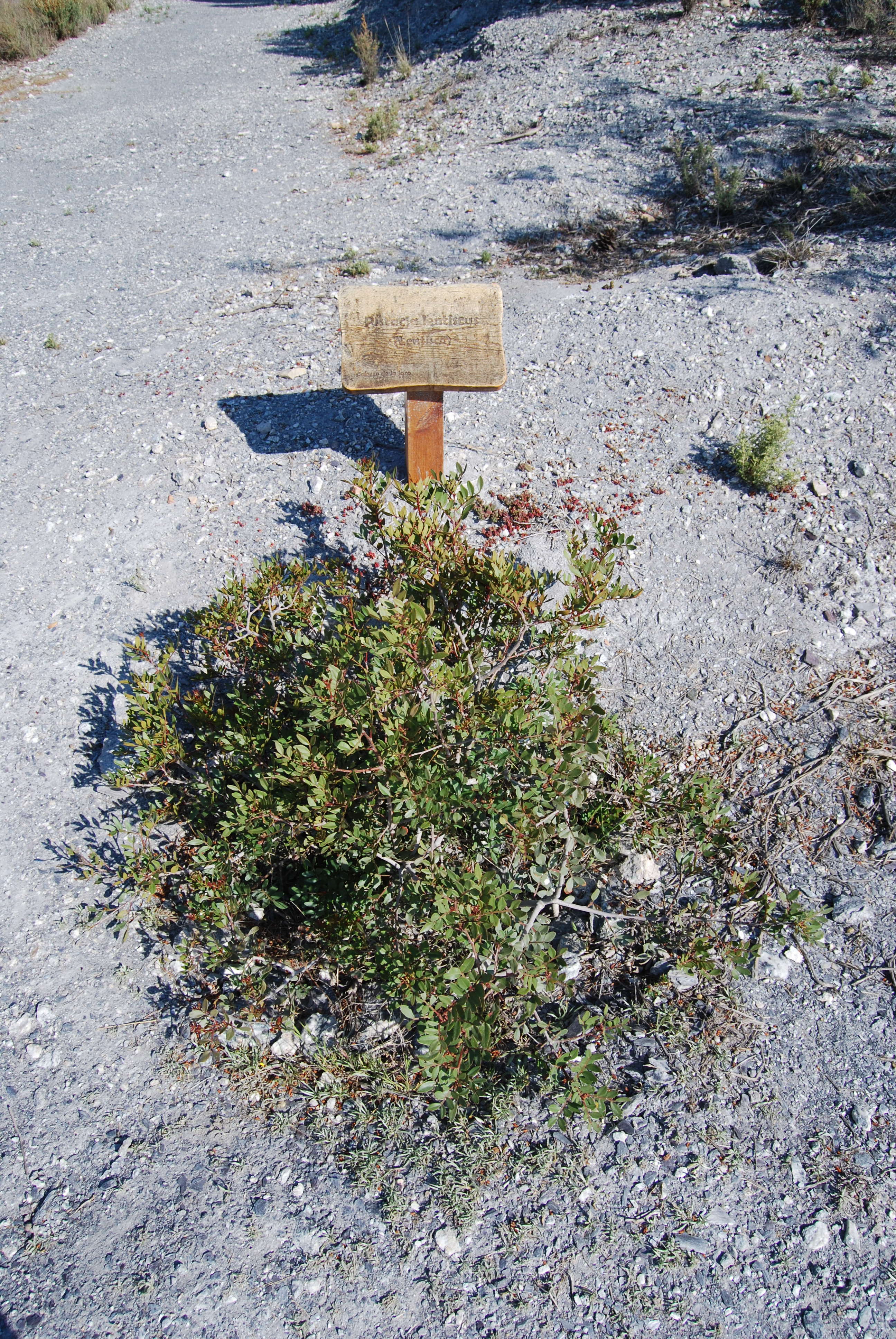 Lentisco en la ruta botánica que discurre por las proximidades del Cabezo de la Jara